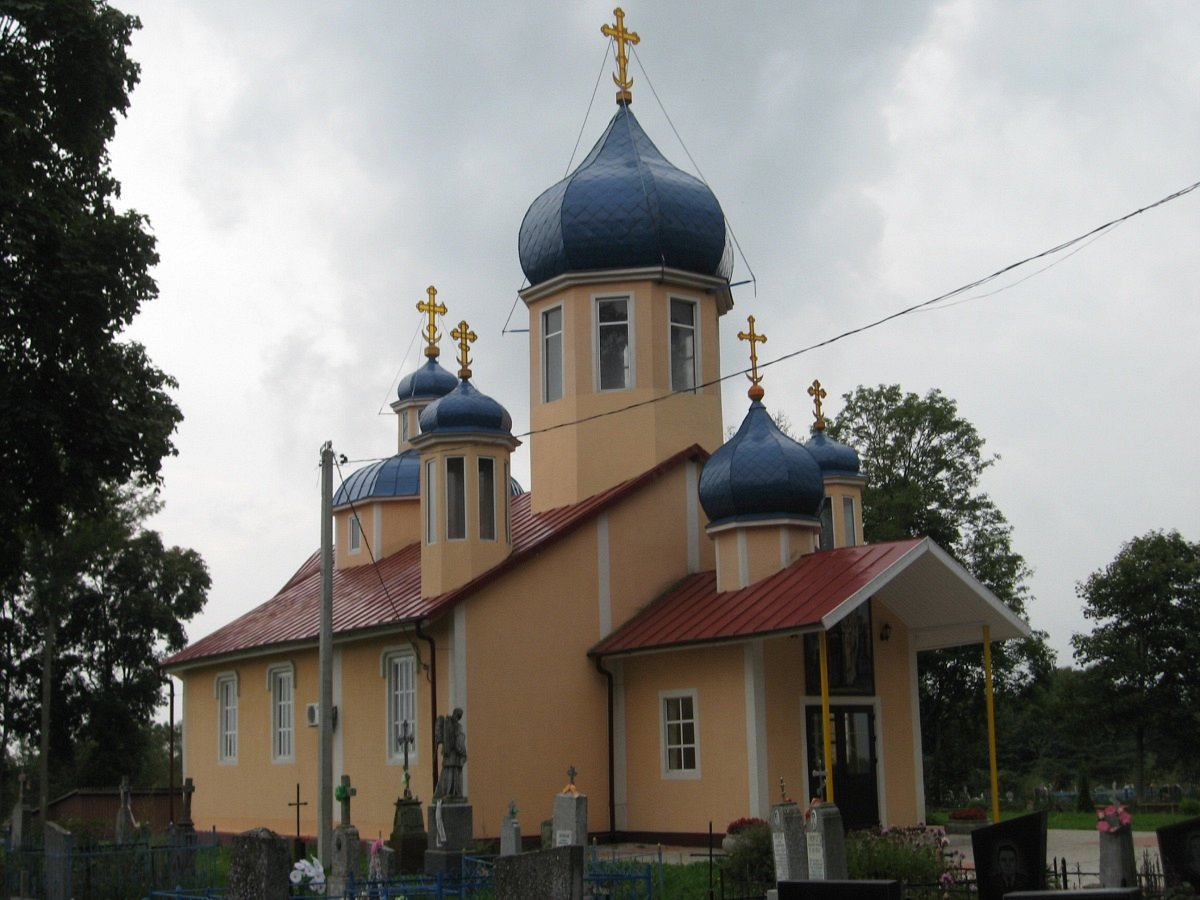 Гошчава. Свята-Крыжаўзвіжанская царква